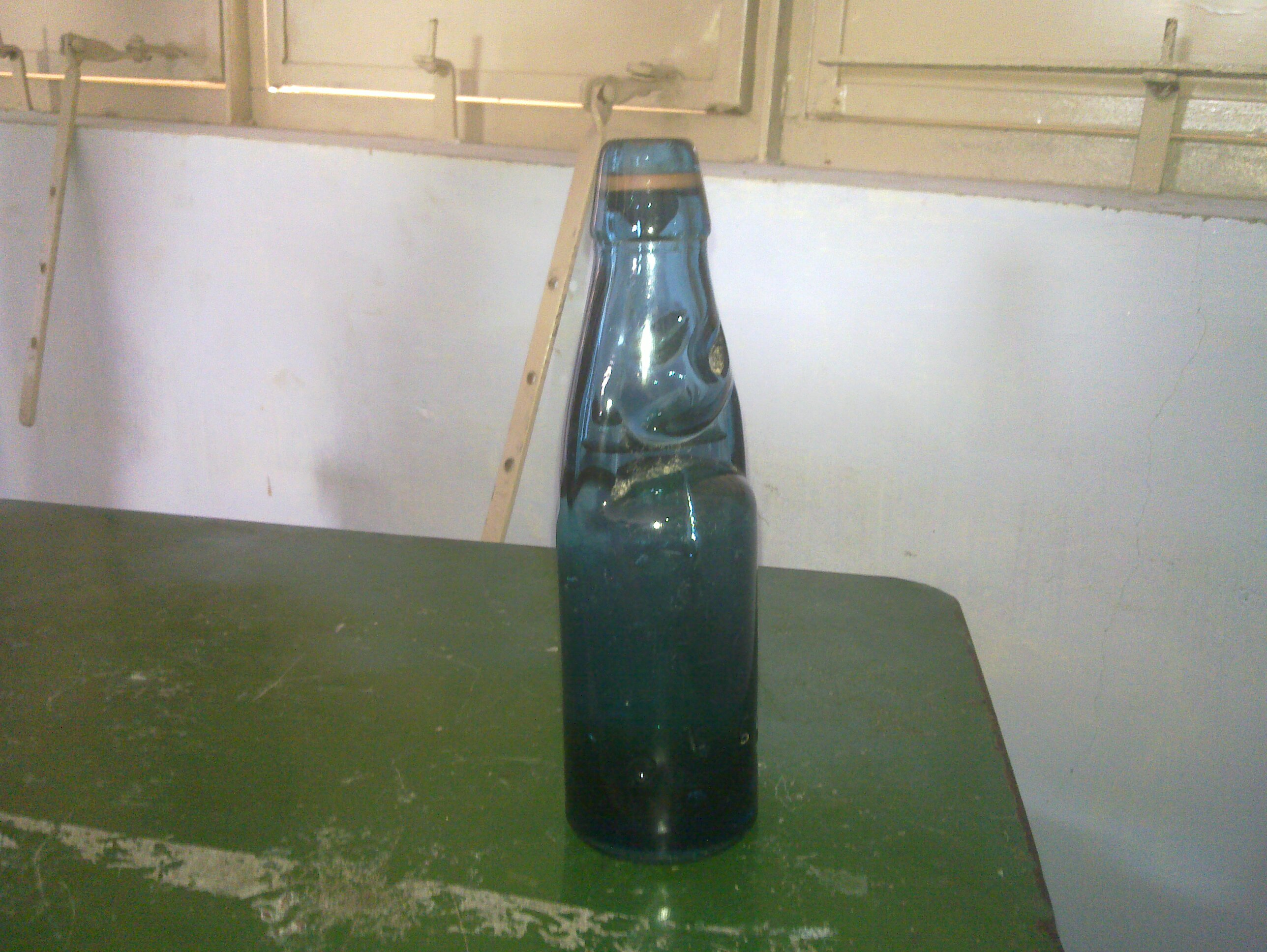 கோலி சோடா என்றழைக்கப்படும் சோடா பாட்டில்